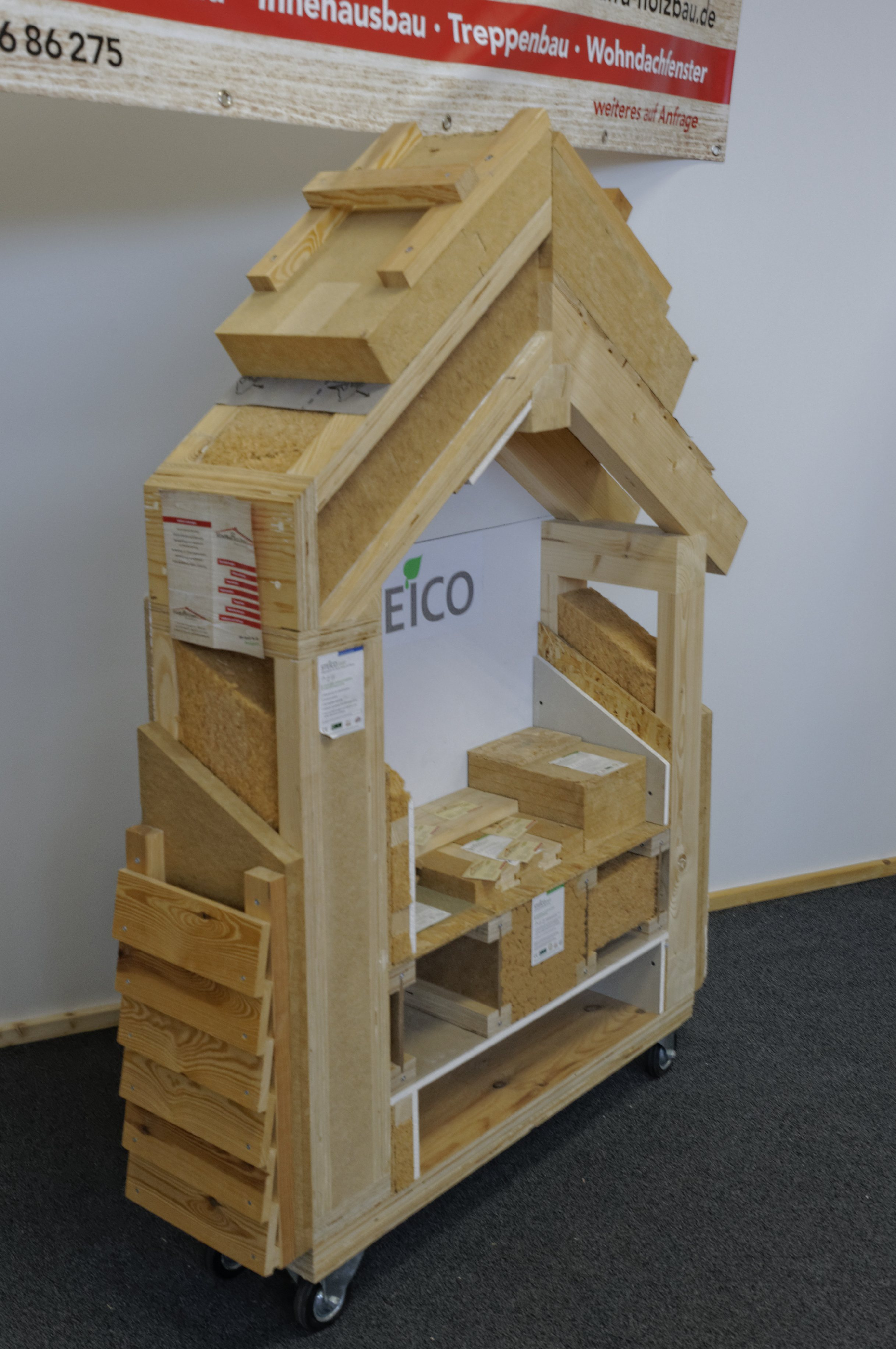 Sindelfingen Haus & Energie 2018